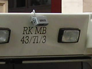 Funkrufname am Heck eines Rettungstransportwagens: Rotkreuz Miesbach 43/71/3 (RK MB 43/71/3), gemeint ist das Bayerische Rote Kreuz, Kreisverband Miesbach